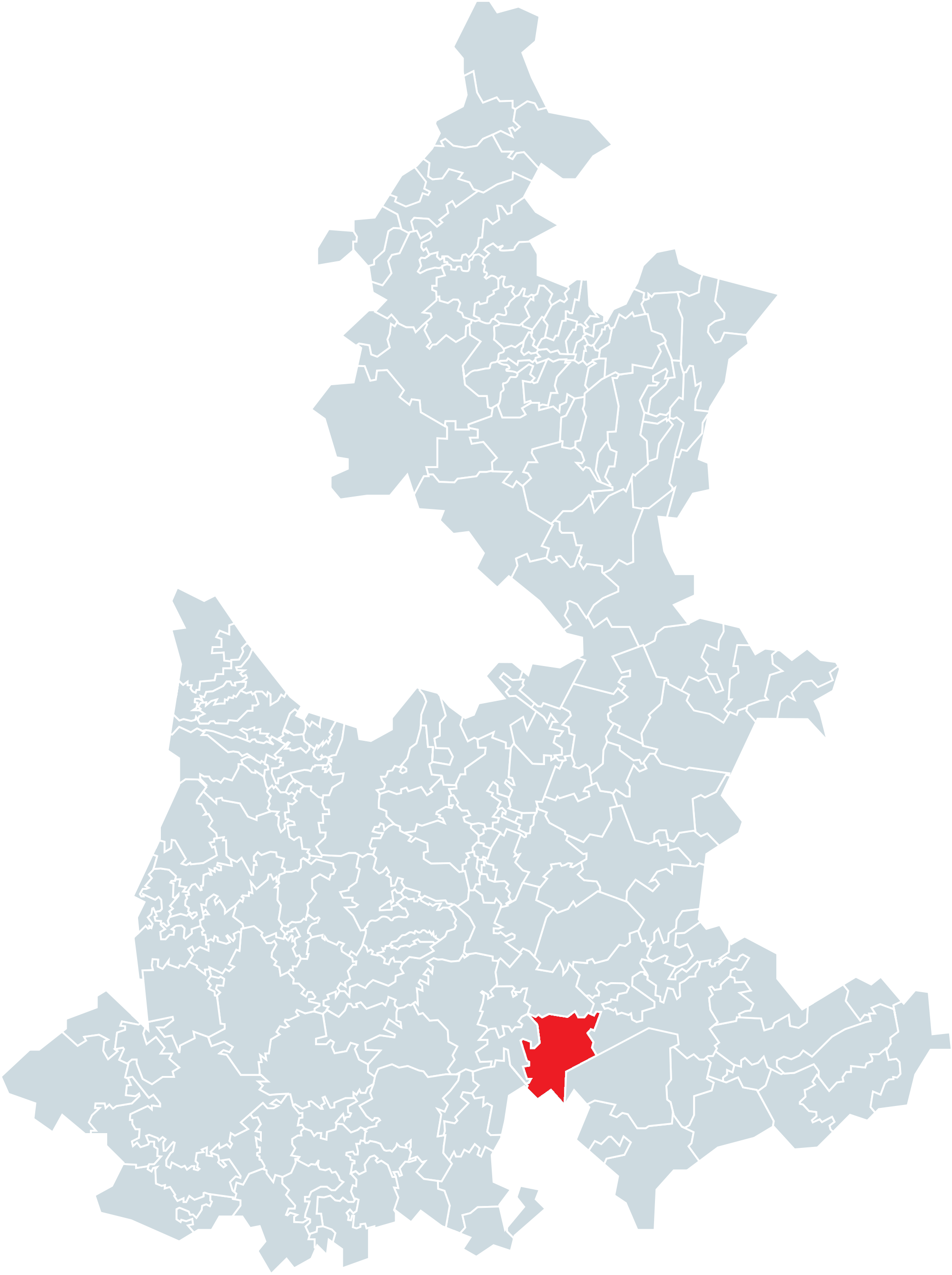 Municipio de Atexcal